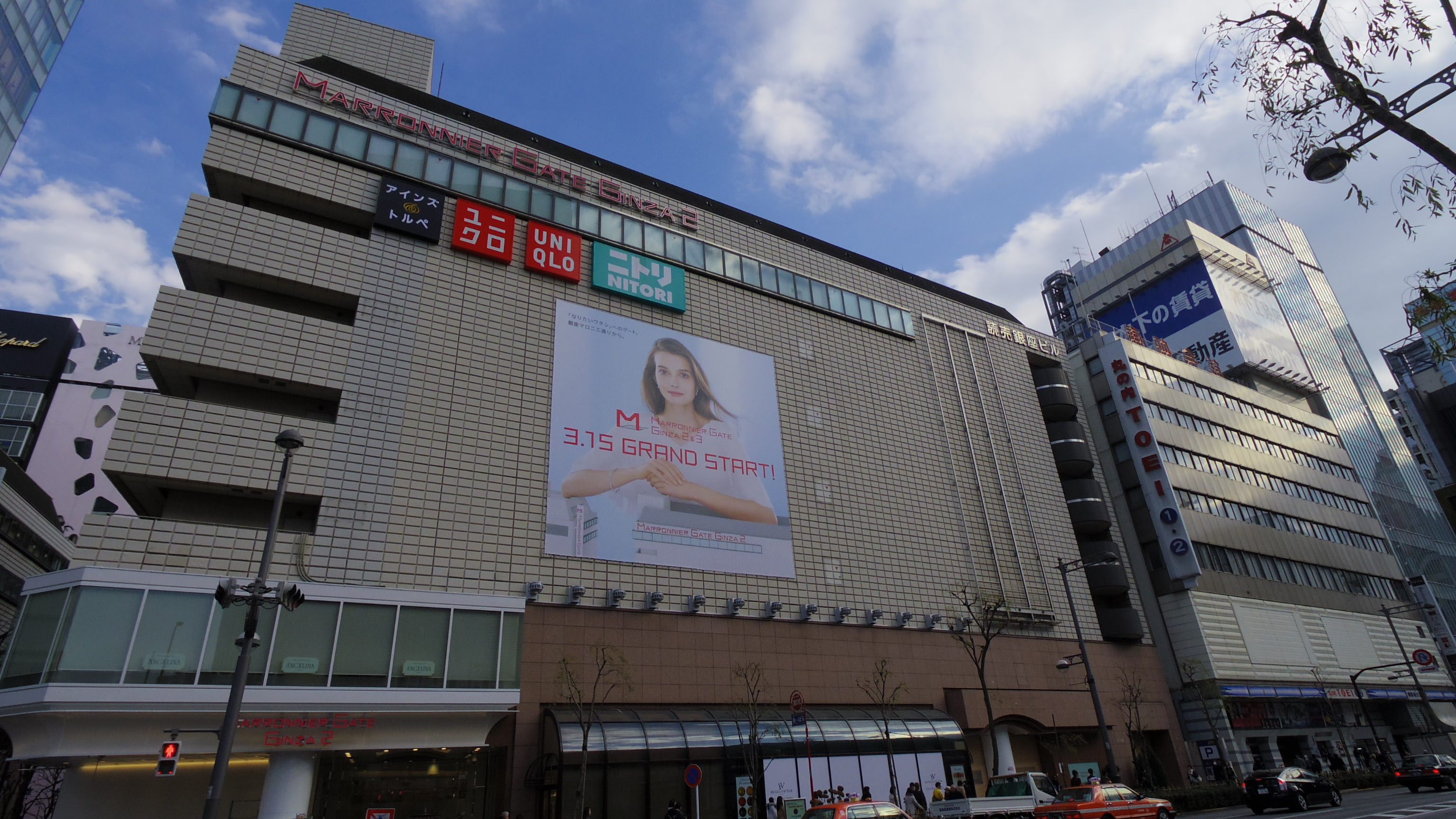 マロニエゲート銀座2（旧・プランタン銀座）